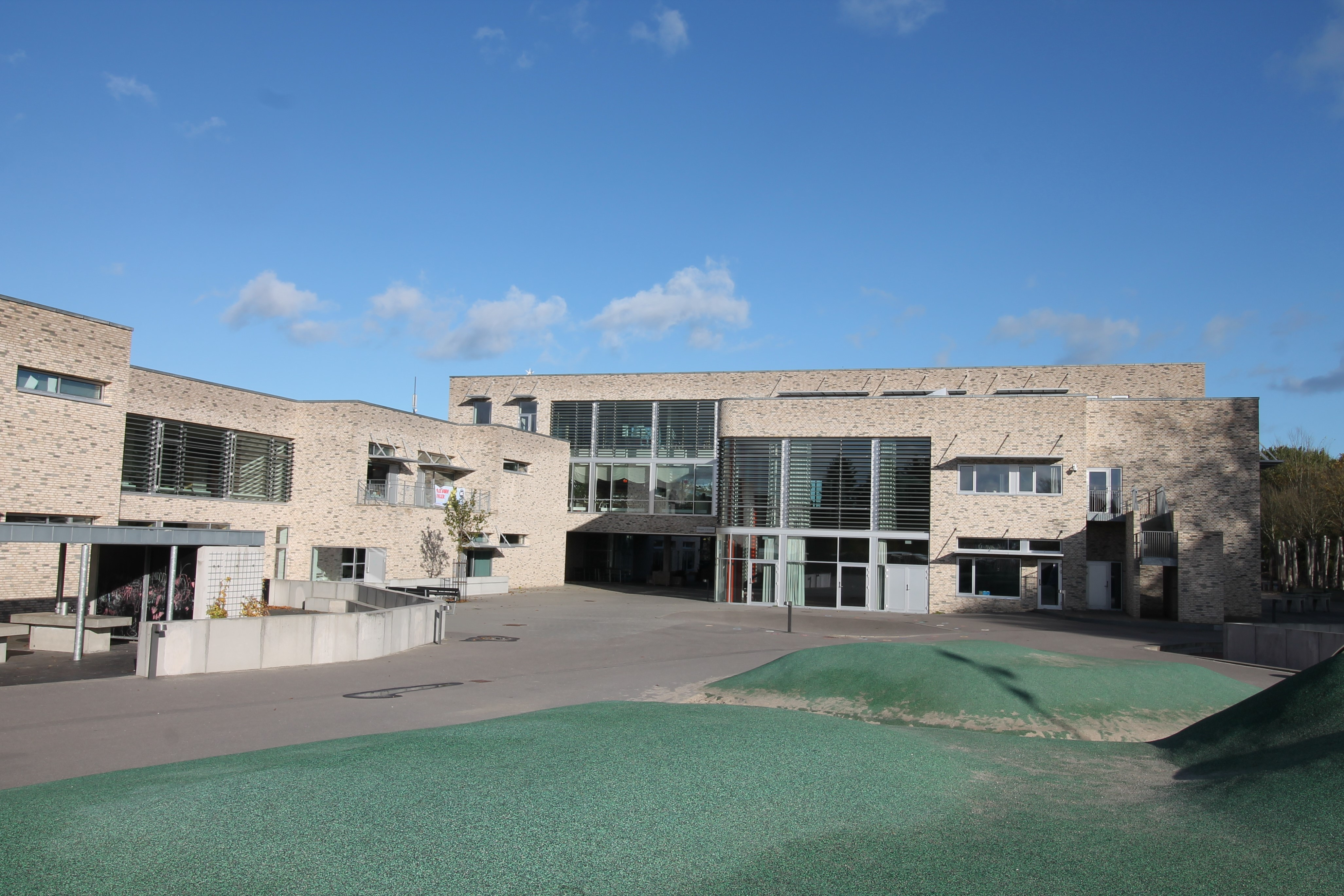 Bagsværd skole